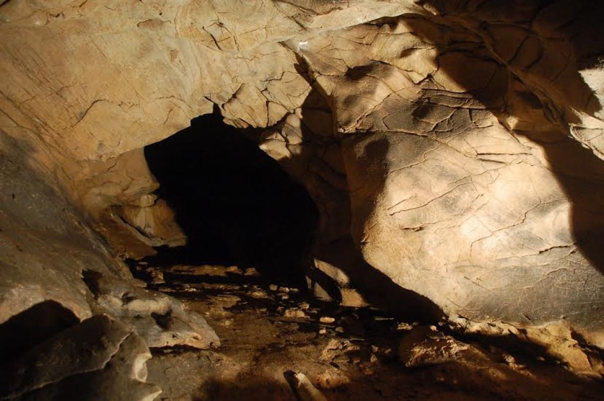 Interior da cova Eirós, Triacastela.